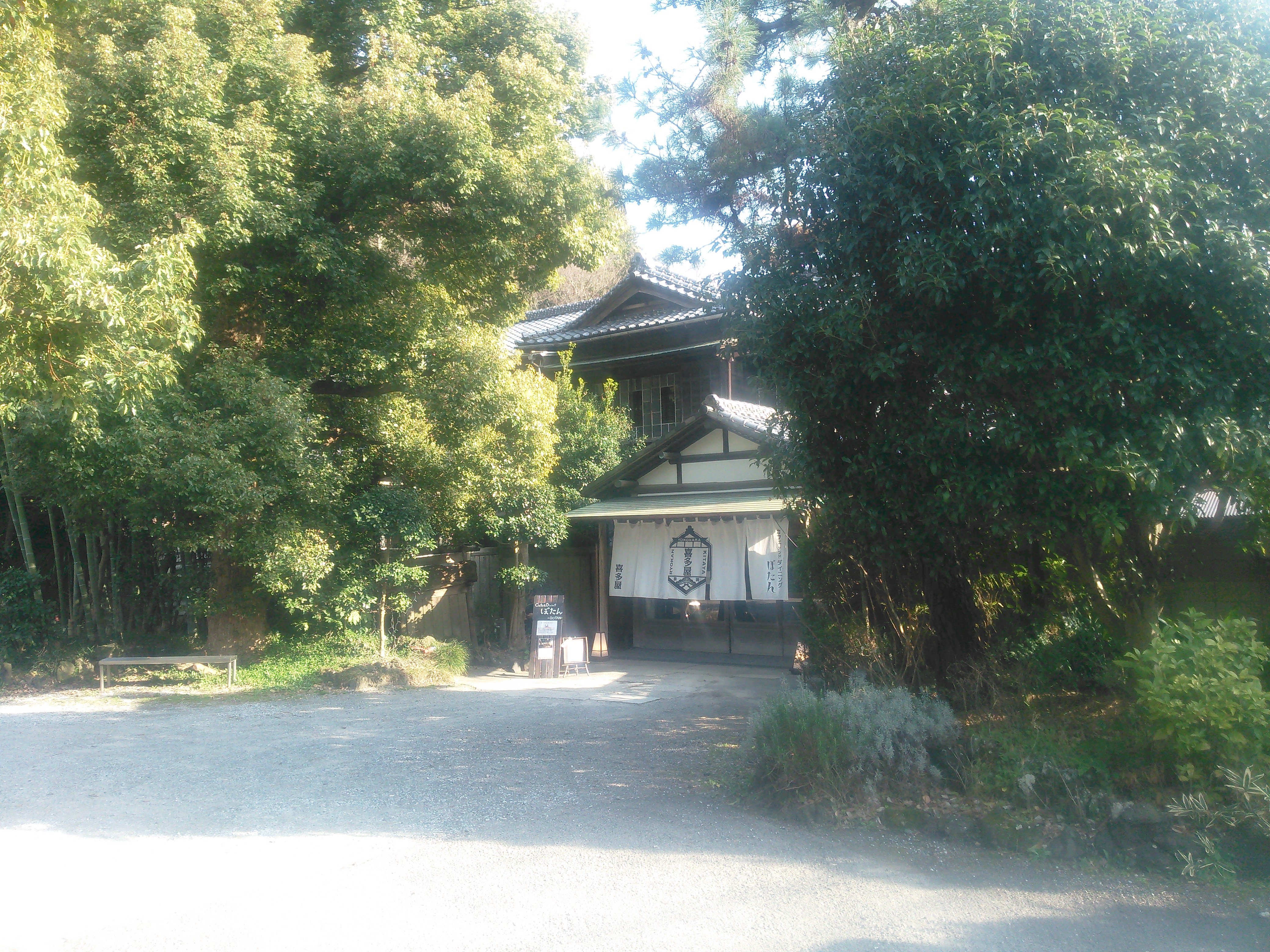 横浜市金沢区柴町、「旅館 喜多屋」。旧「料亭 金沢園」。